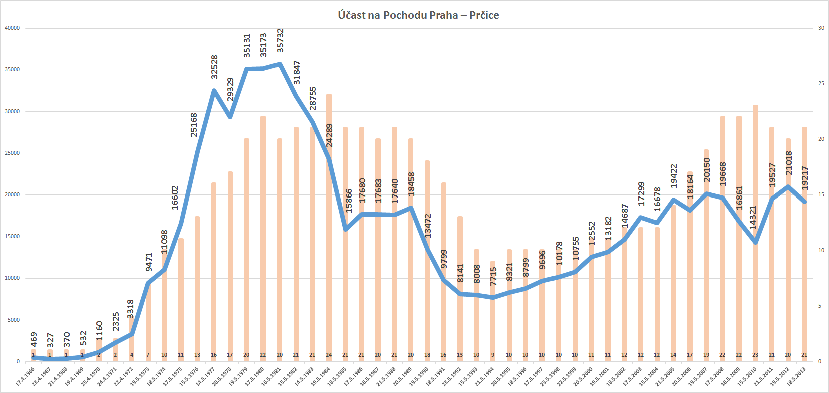 Grafické znázornění počtu účastníků Pochodu Praha – Prčice na všech trasách (modrá) a počtu tras (oranžová)